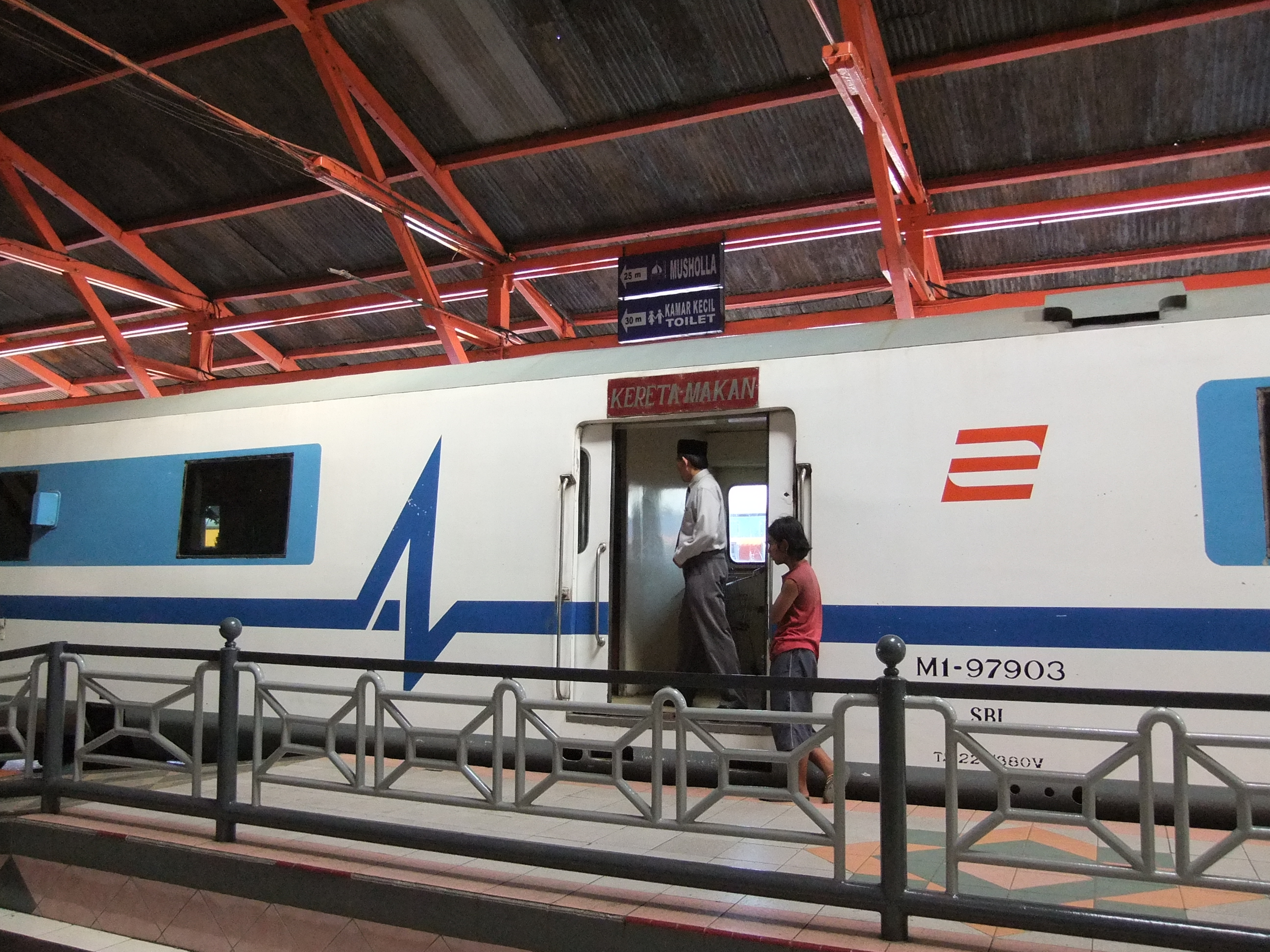 Kereta makan Argo Bromo Anggrek